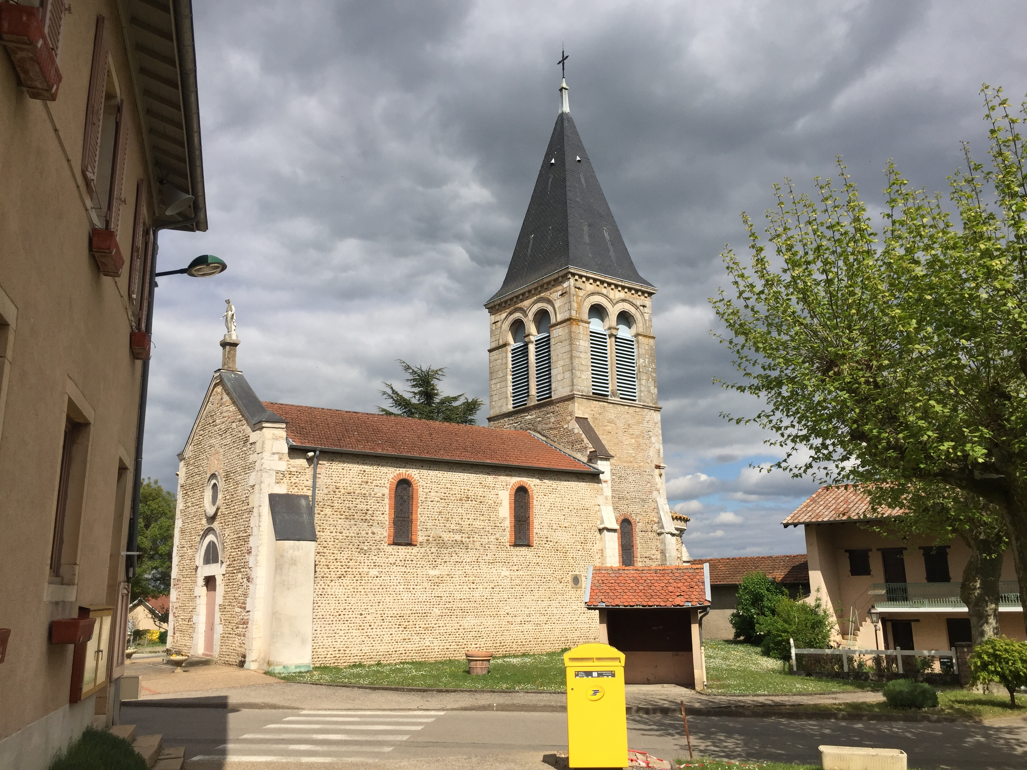 Image du village de Relevant, dans l'Ain, en France..